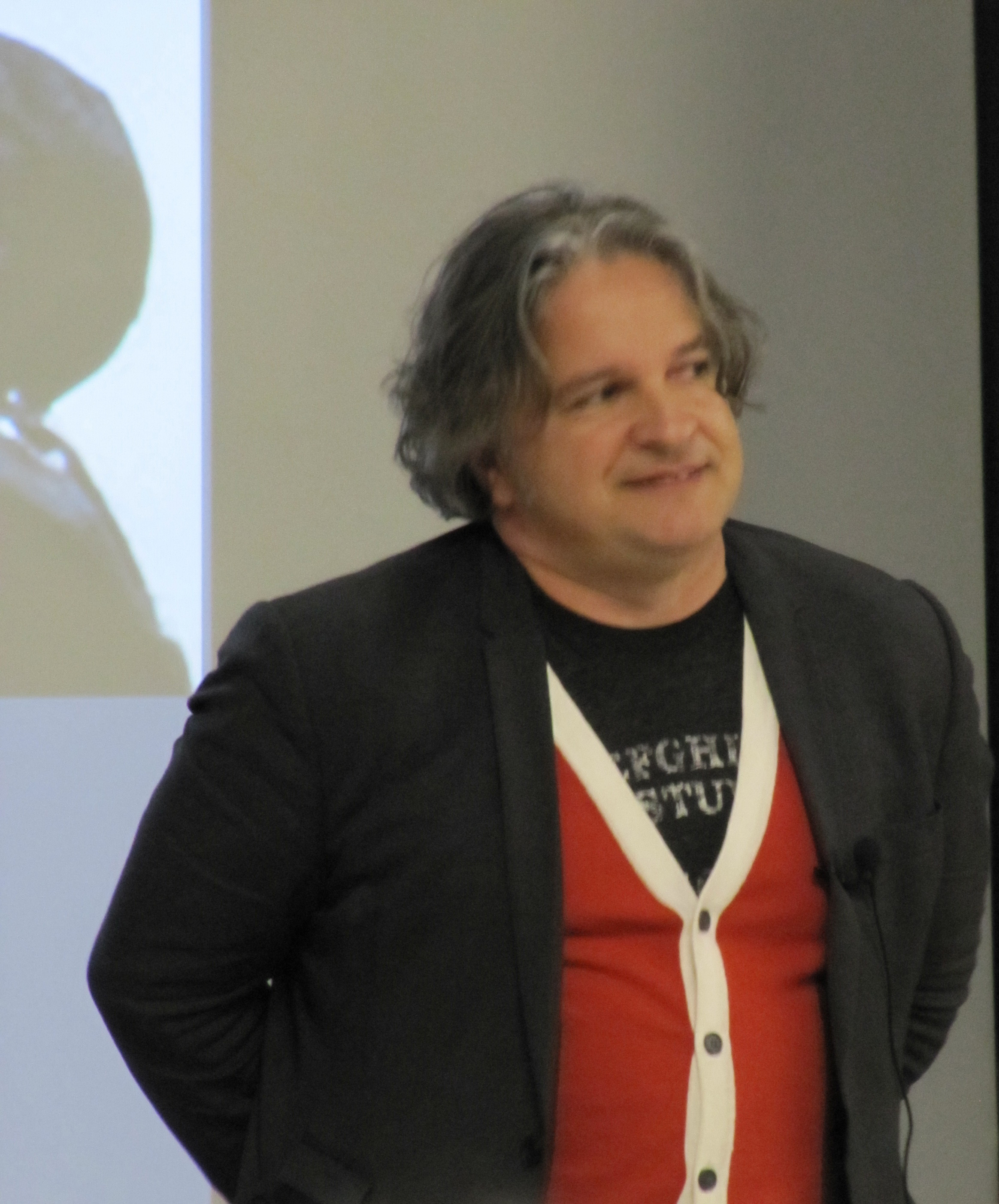 Daniel Bélanger - La liberté comme processus de création - Université de Sherbrooke - novembre 2011